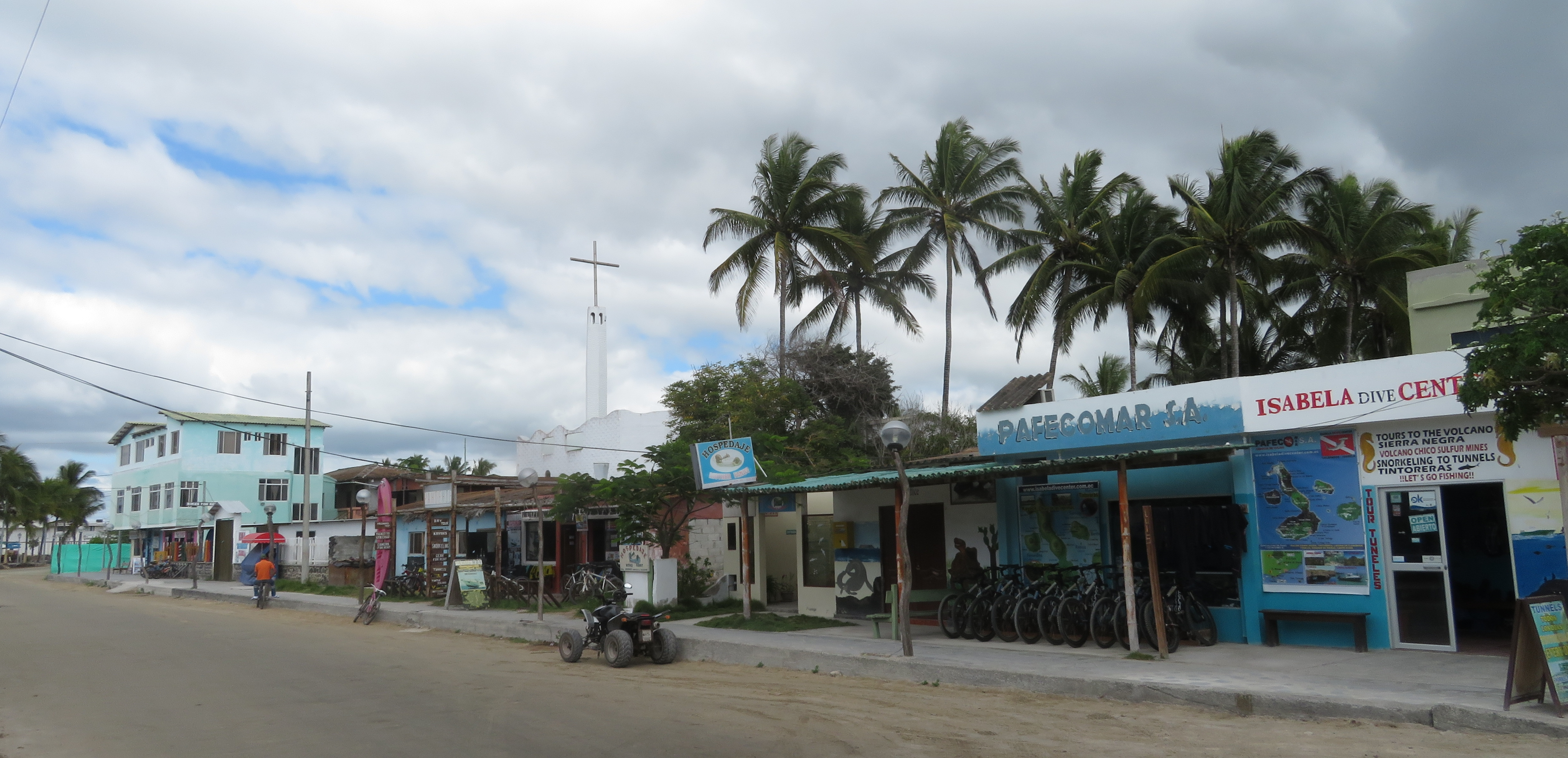 Calle principal, Puerto Villamil, Isla Isabela, Islas Galápagos, Ecuador